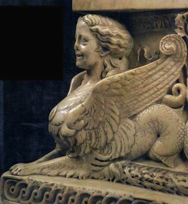 Sfinge. Dettaglio dal pulpito rinascimentale del Duomo di Prato.